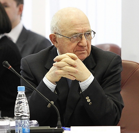 Никита Симонян